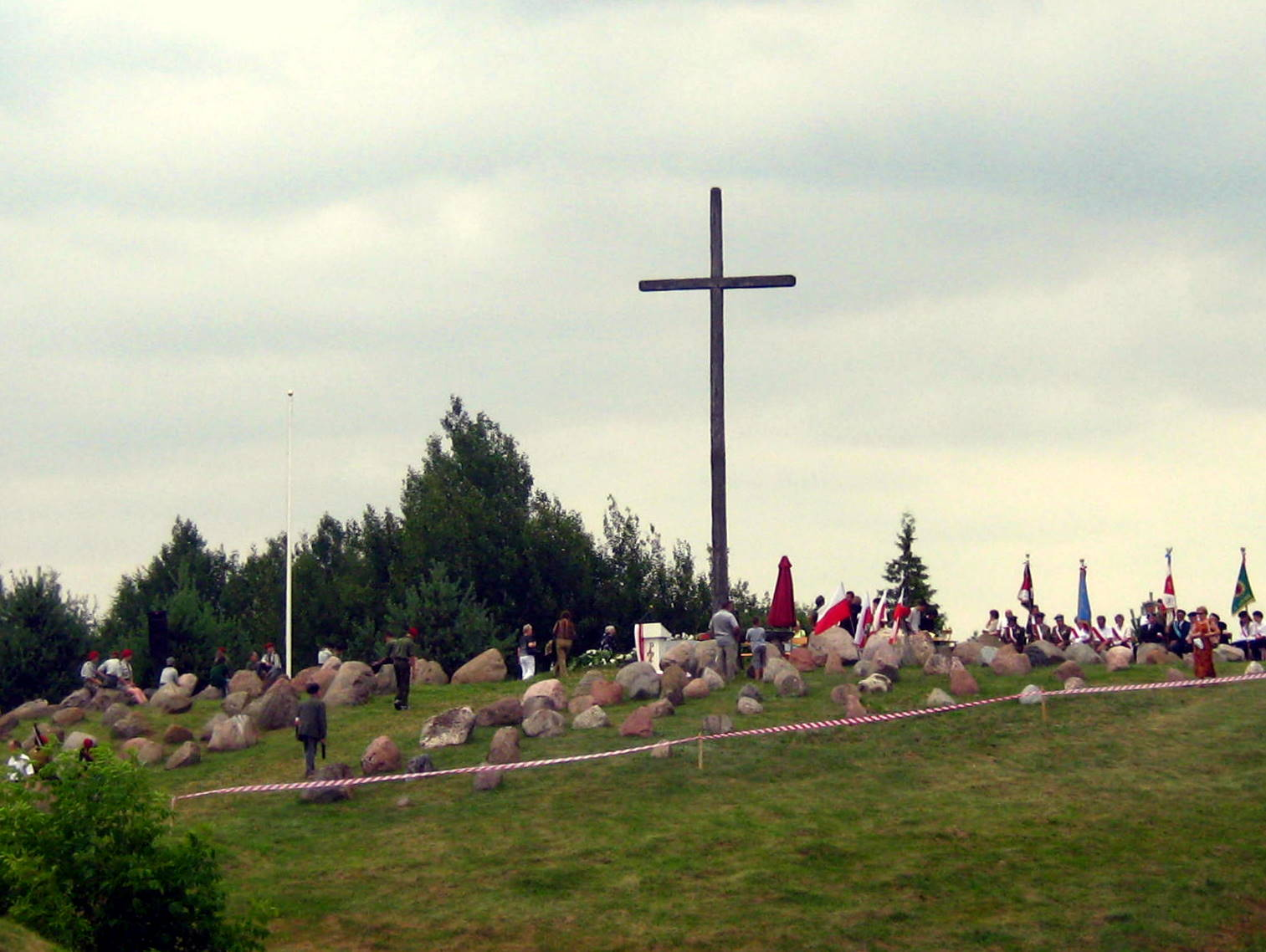 Krzyż na wzgórzu w Gibach.